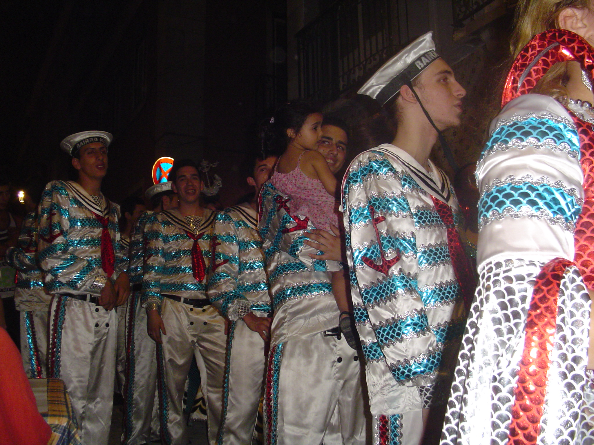 Marchas Populares de Lisboa 2009.